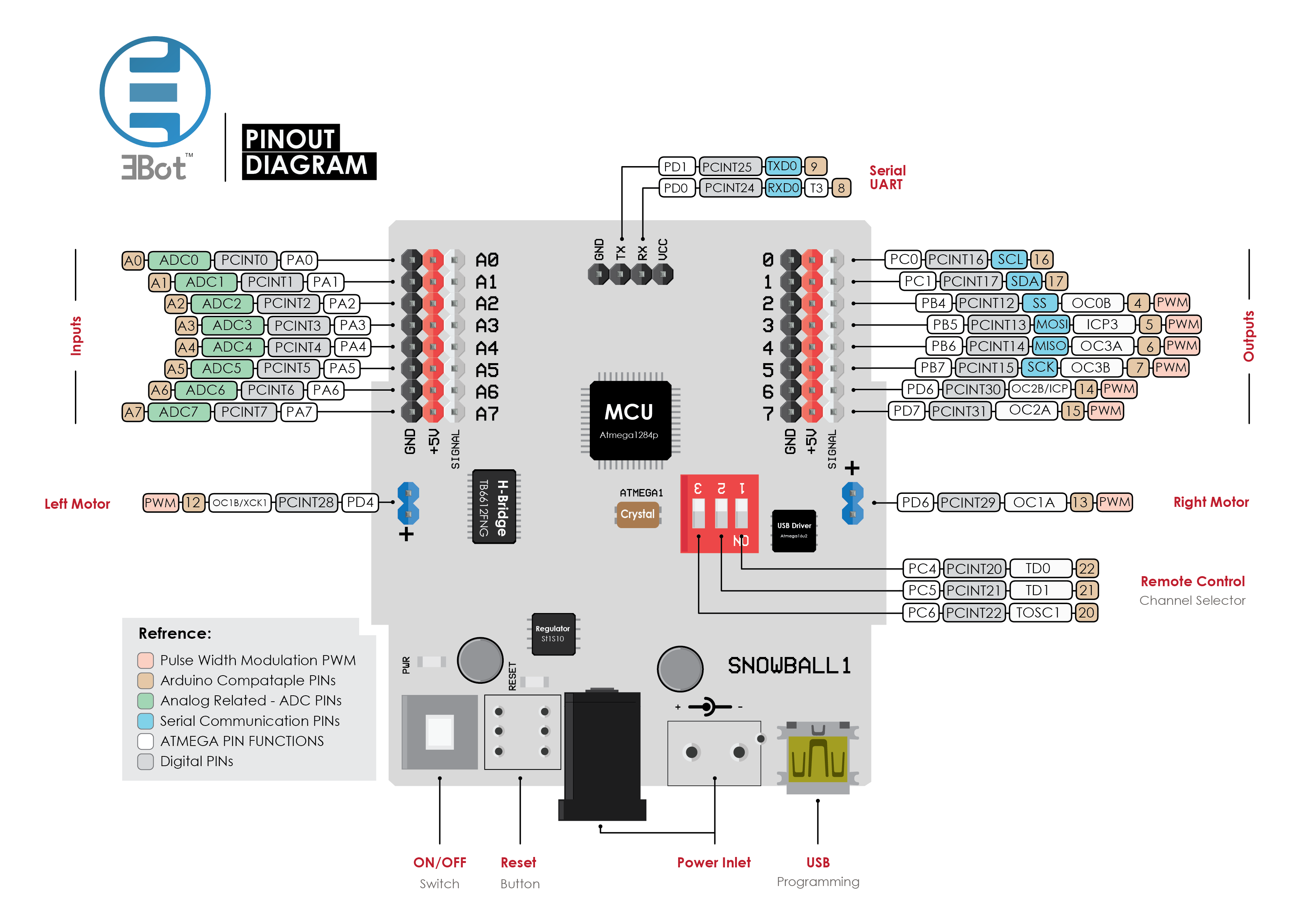 خريطة منافذ وحدة إي بوت ٨